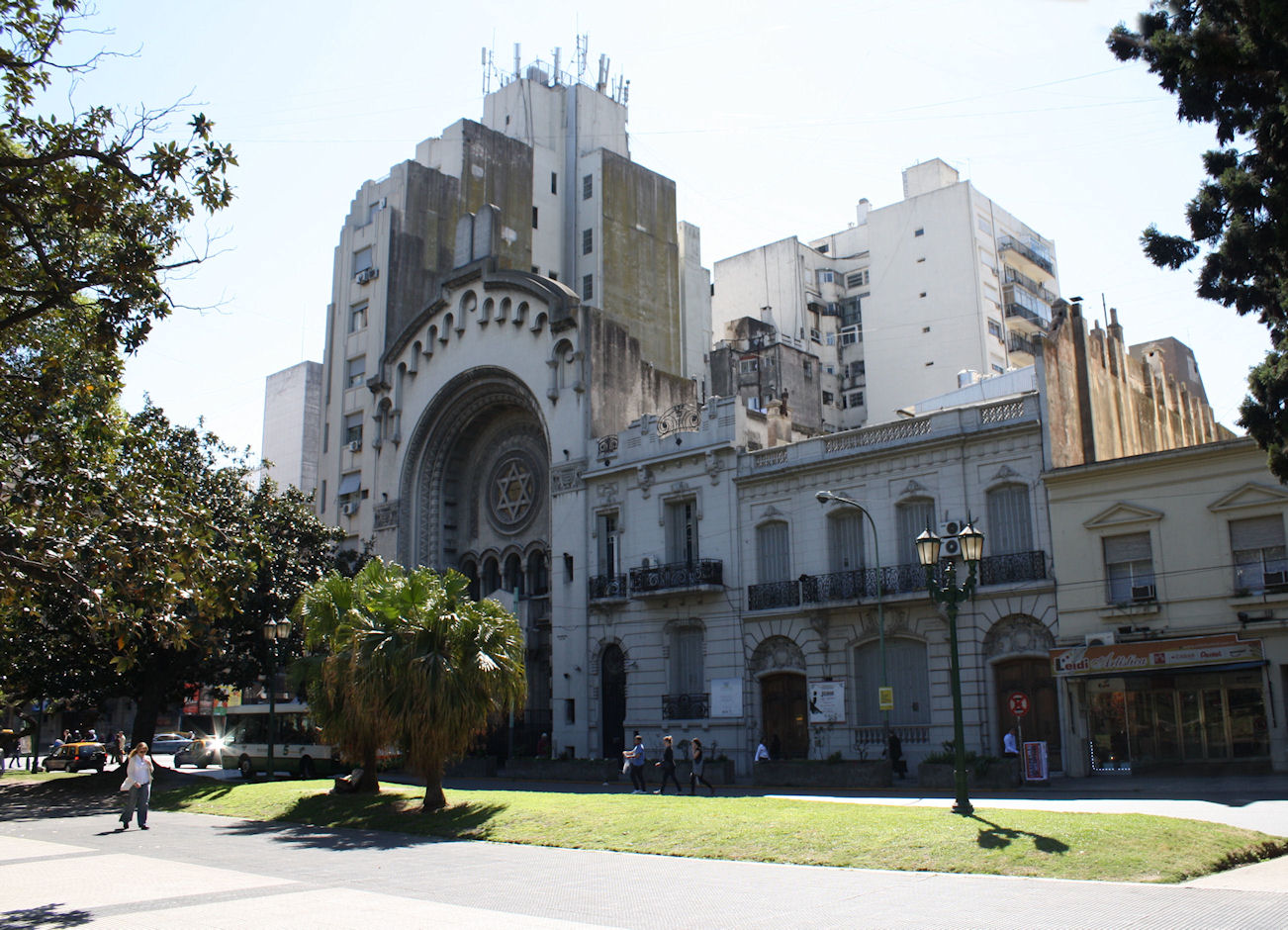 Templo Libertad, a synagogue in Buenos Aires.